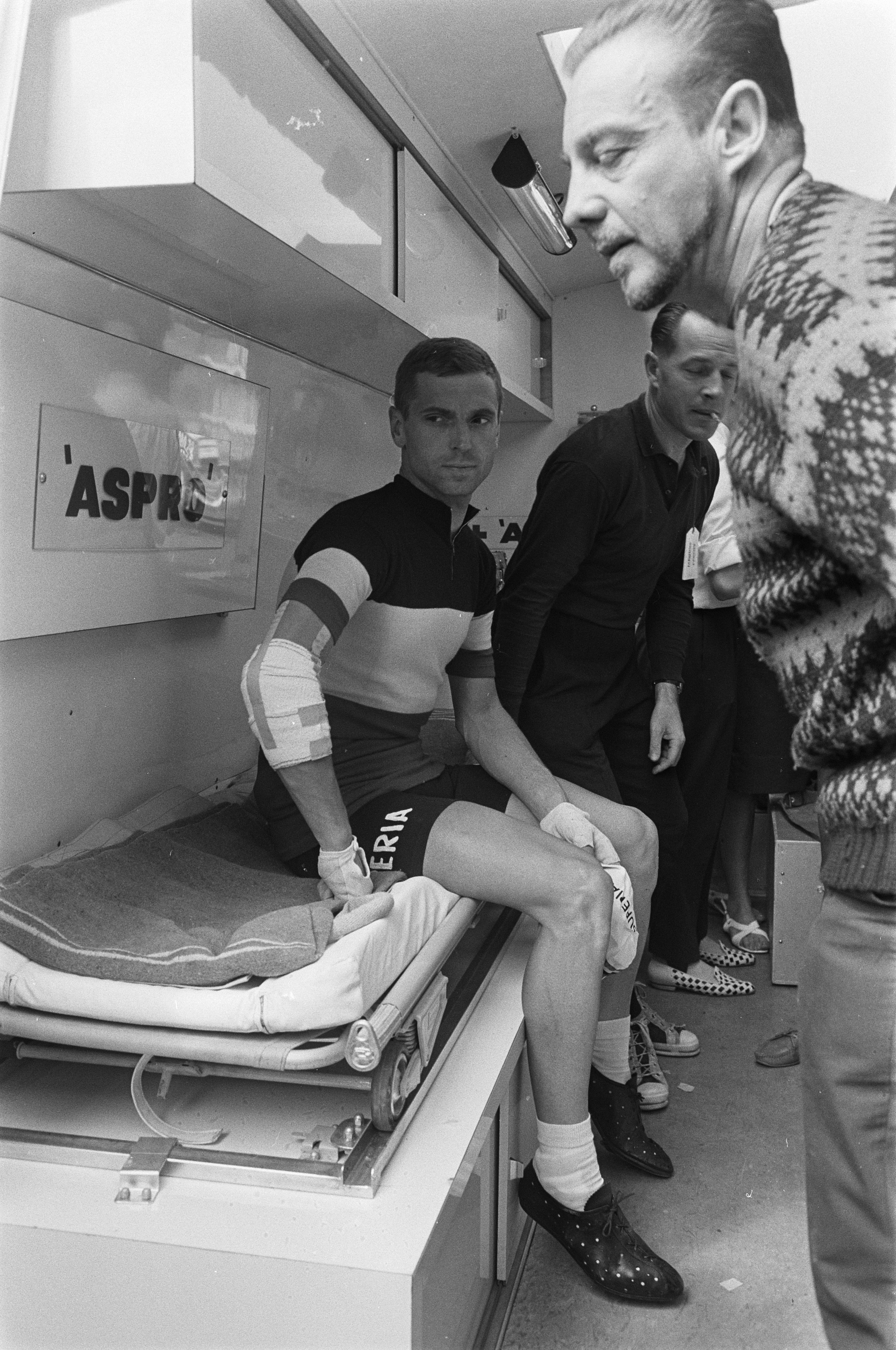 51ste Tour de France 1964. Rik van Looy in bezemwagen.